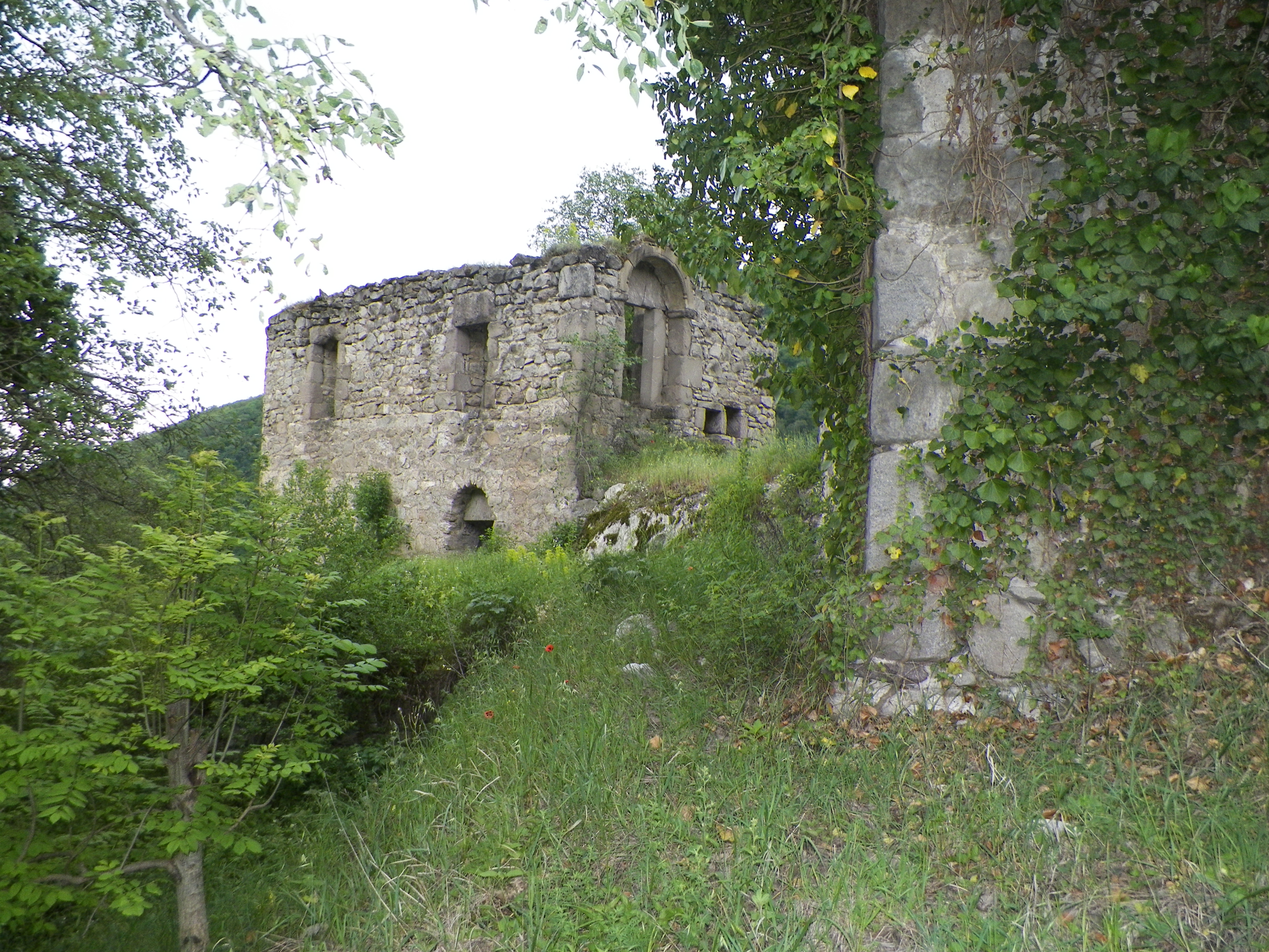 Գտնվում է Արցախի Հանրապետության Մարտակերտի շրջանի Մադաղիս գյուղից 7 կմ հեռավորության վրա, Ջրվշտիկ ջրվեժի մոտ: Նկարում վանքի սեղանատունն է 2